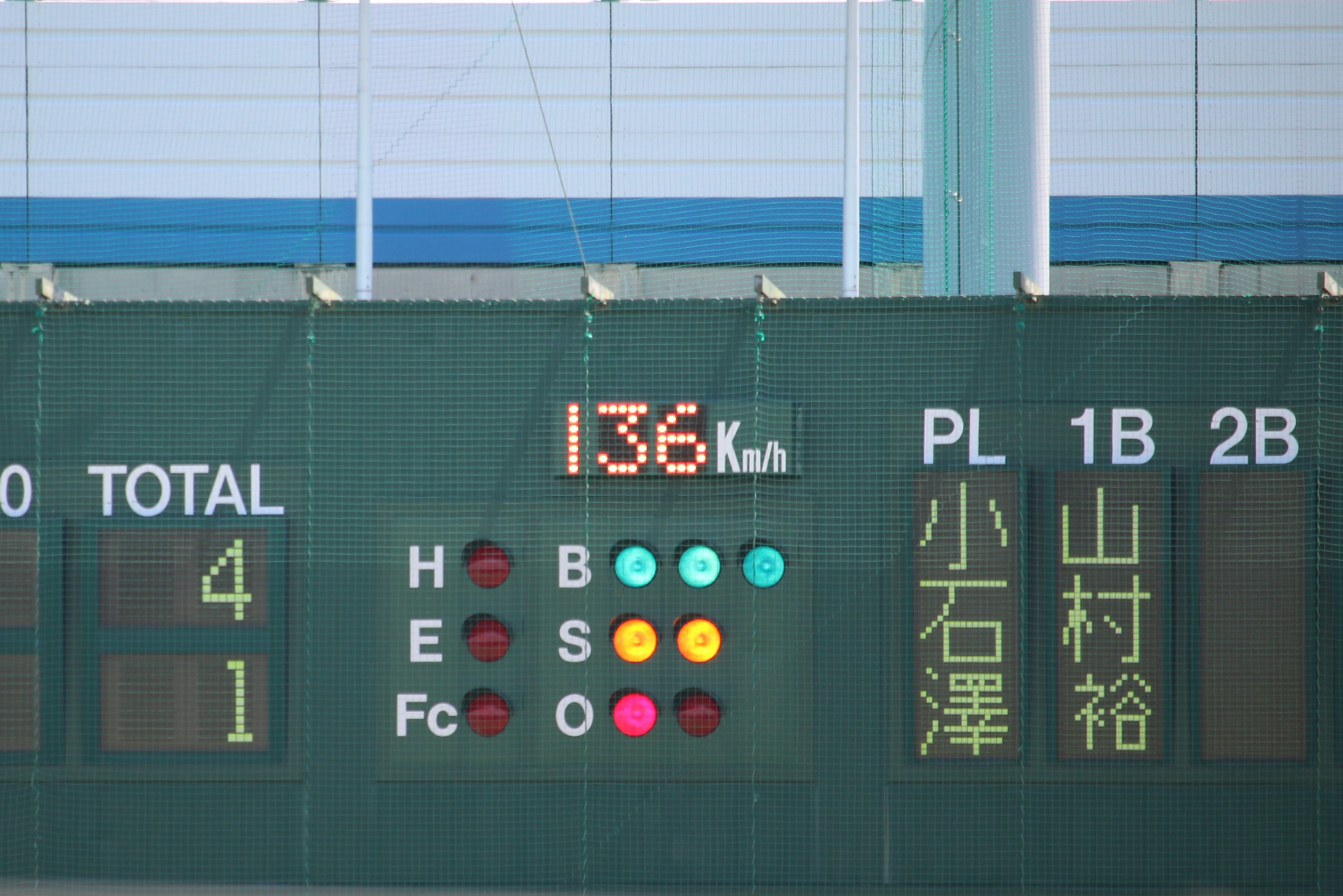 阪神鳴尾浜球場球速表示20140501